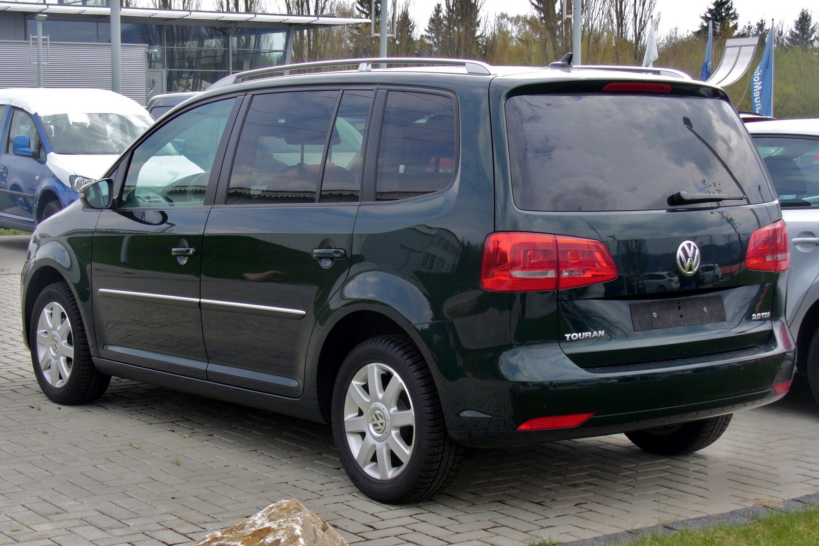 Volkswagen Touran Facelift II